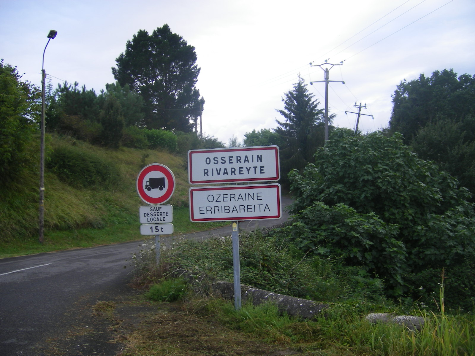 Osserain